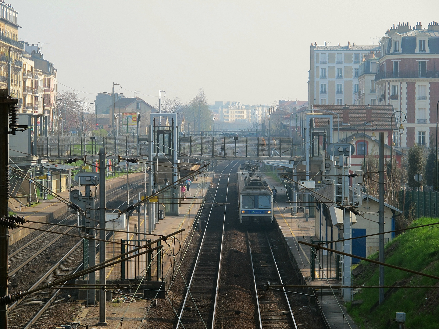 La gare de La Garenne-Colombes (Hauts-de-Seine, France).